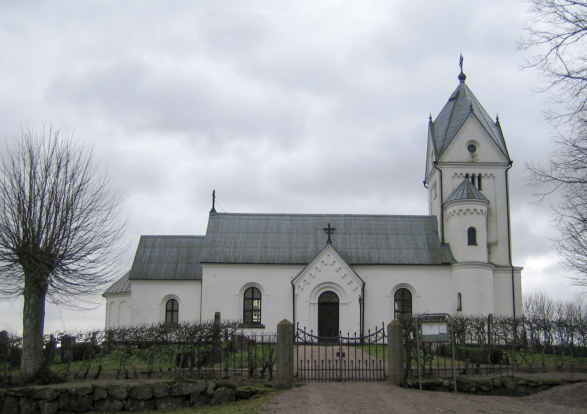 Baldringe kyrka in Skåne, Sweden